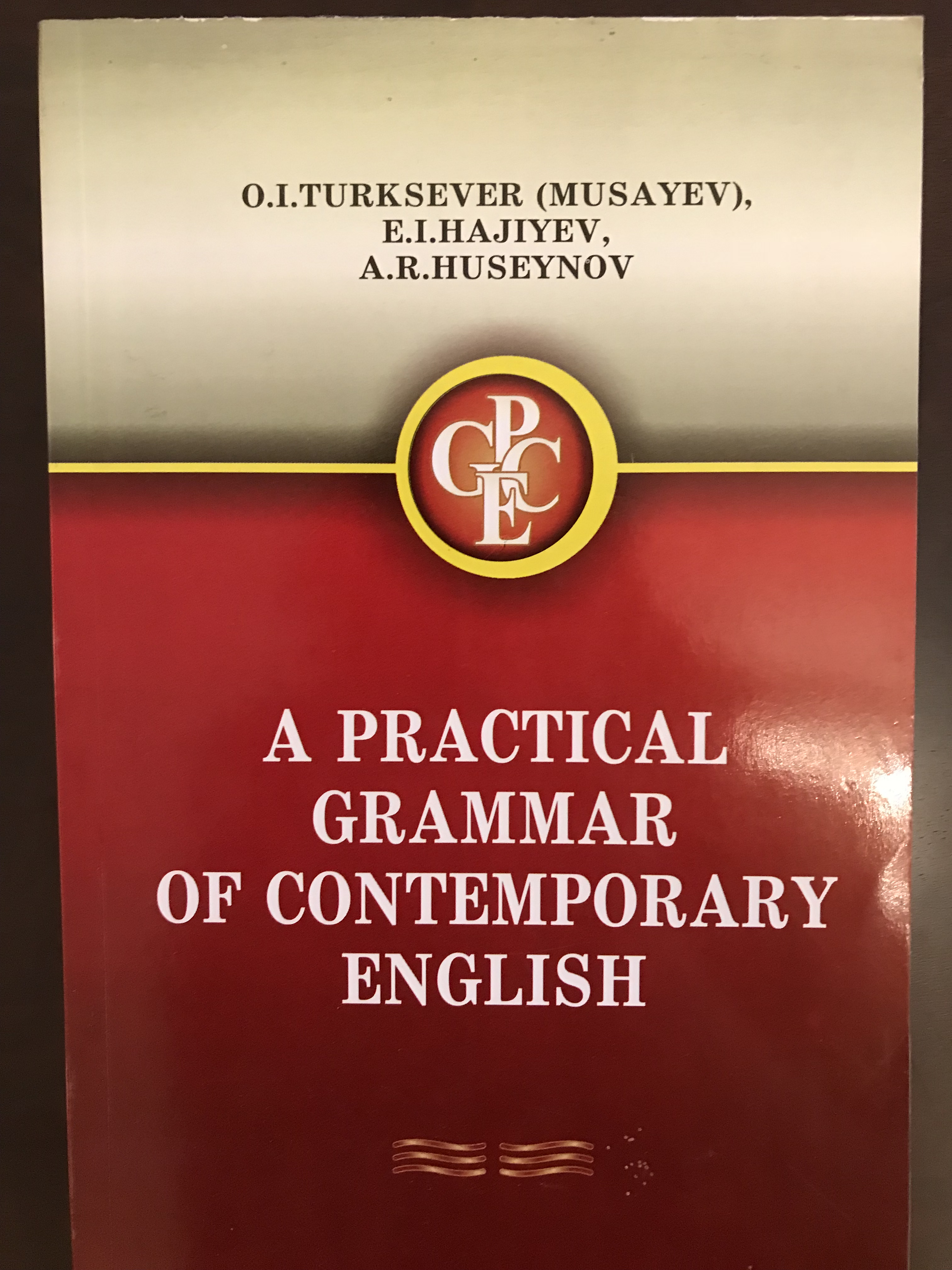 A PRACTICAL GRAMMAR OF CONTEMPORARY ENGLISH. BAKI- 2014